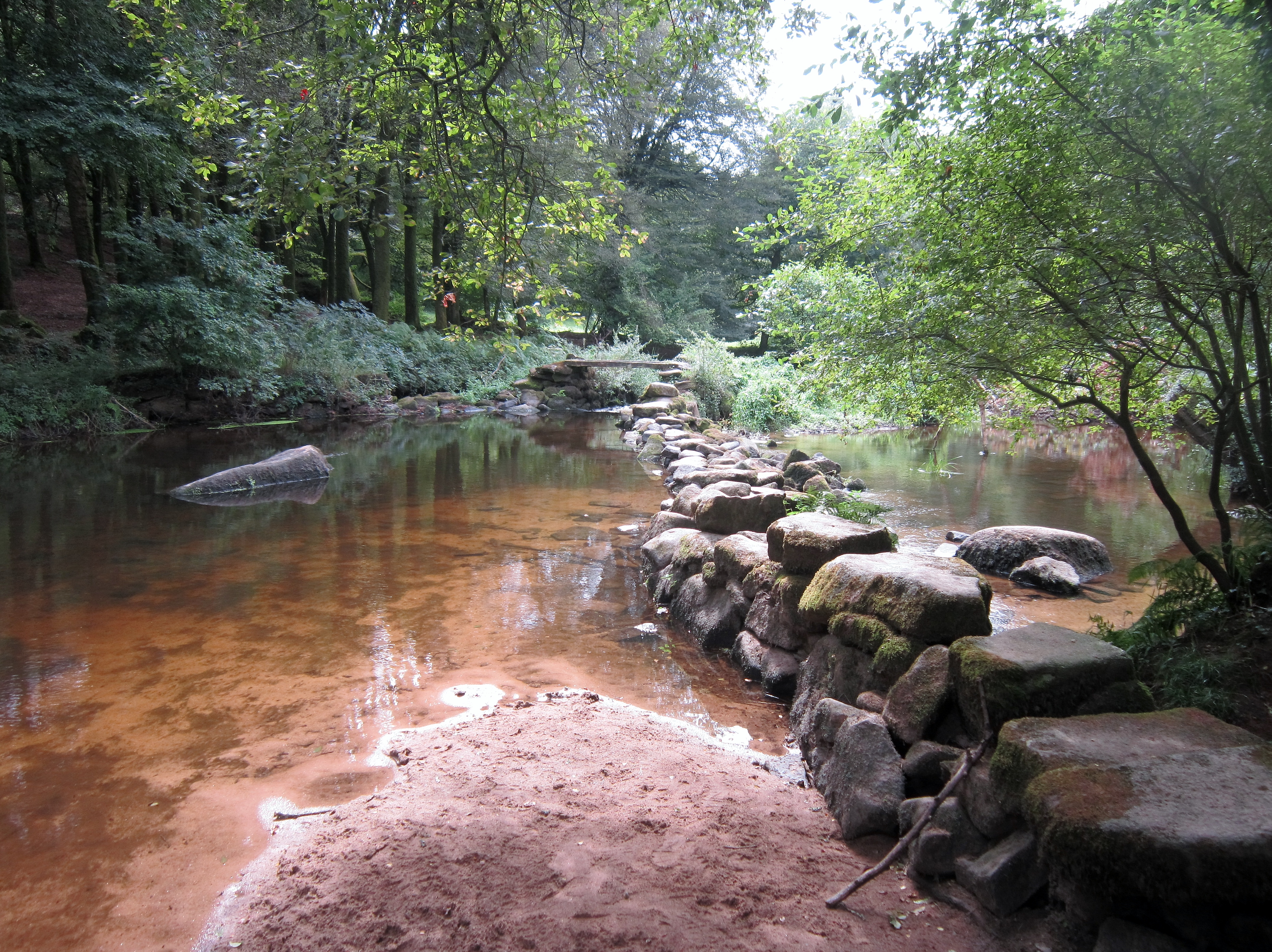 L'ancienne pêcherie ou gored de Coscodo sur le Scorff (limite entre les communes de Berné et d'Inguiniel) ; on y pêchait notamment des saumons et des anguilles. Ce barrage à poissons constitué de pierres barrant en grande partie le cours d'eau, un filet installé à la passe subsistante permettant de capturer les poisons lors de leur migration, était l'un des quatre qui appartenaient à la seigneurie de Pontcallec sous l'Ancien Régime. Vers 1860, cette pêcherie est la propriété de Messieurs Le Strat et Le Bellour ; elle a dû fonctionner jusqu'au début du XXe siècle.